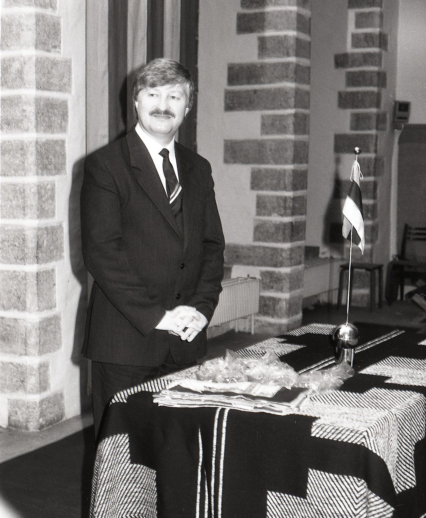 Hardo Aasmäe, linnapea 91